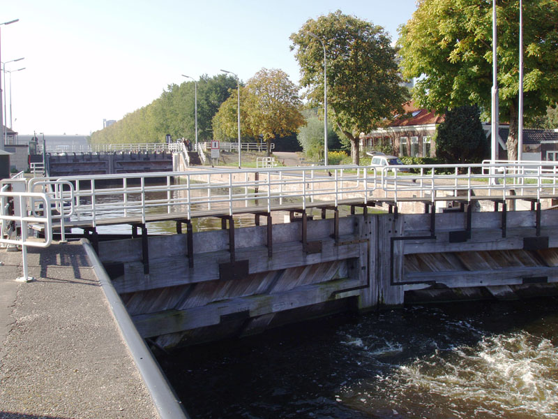 Willemssluizen in het Noordhollands Kanaal in Amsterdam met op de achtergrond sluizwachterswoningen en nog verder de kap van het Centraal Station van Amsterdam in 2010